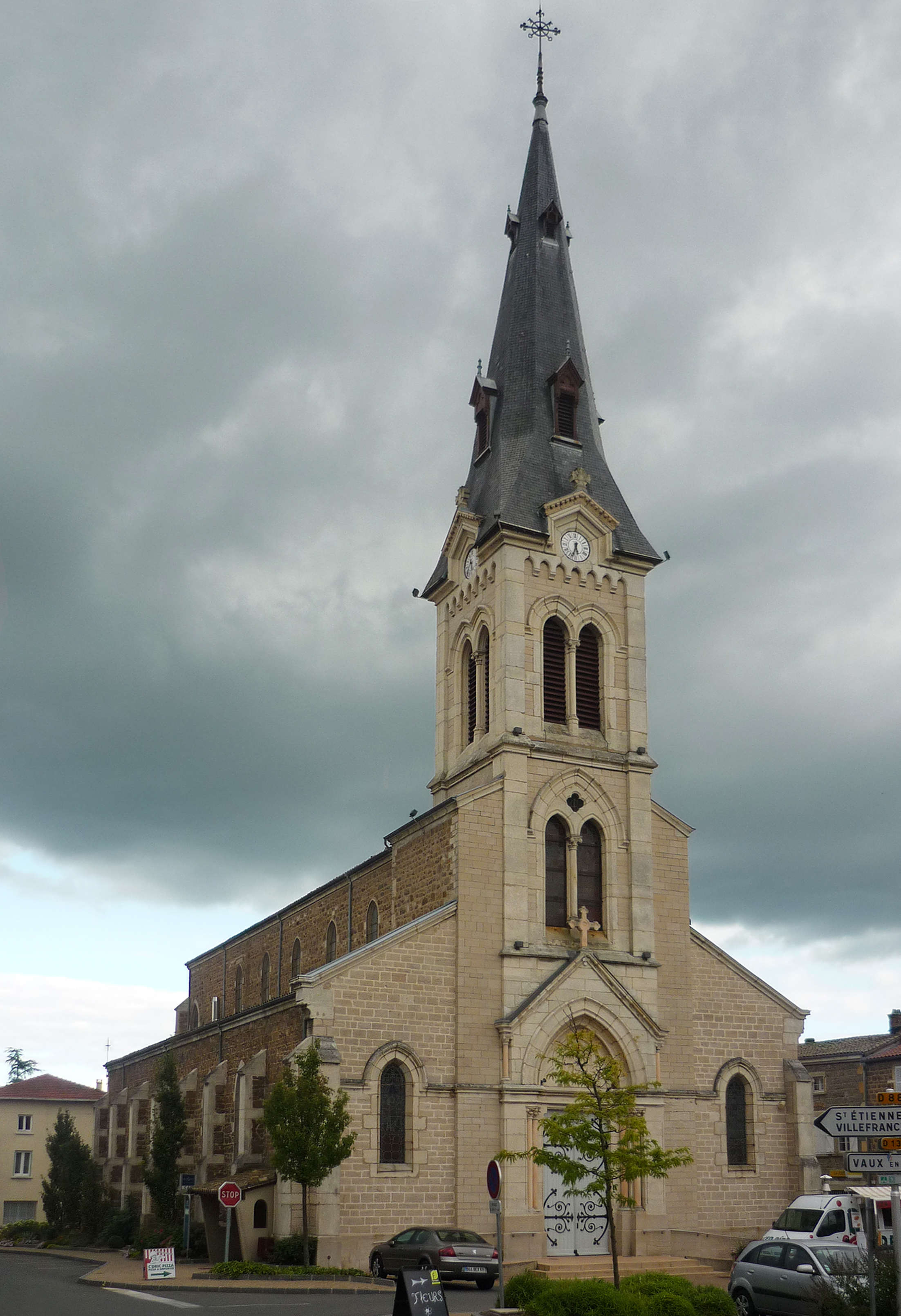 Die Kirche der französischen Gemeinde Le Perréon im Département Rhône.